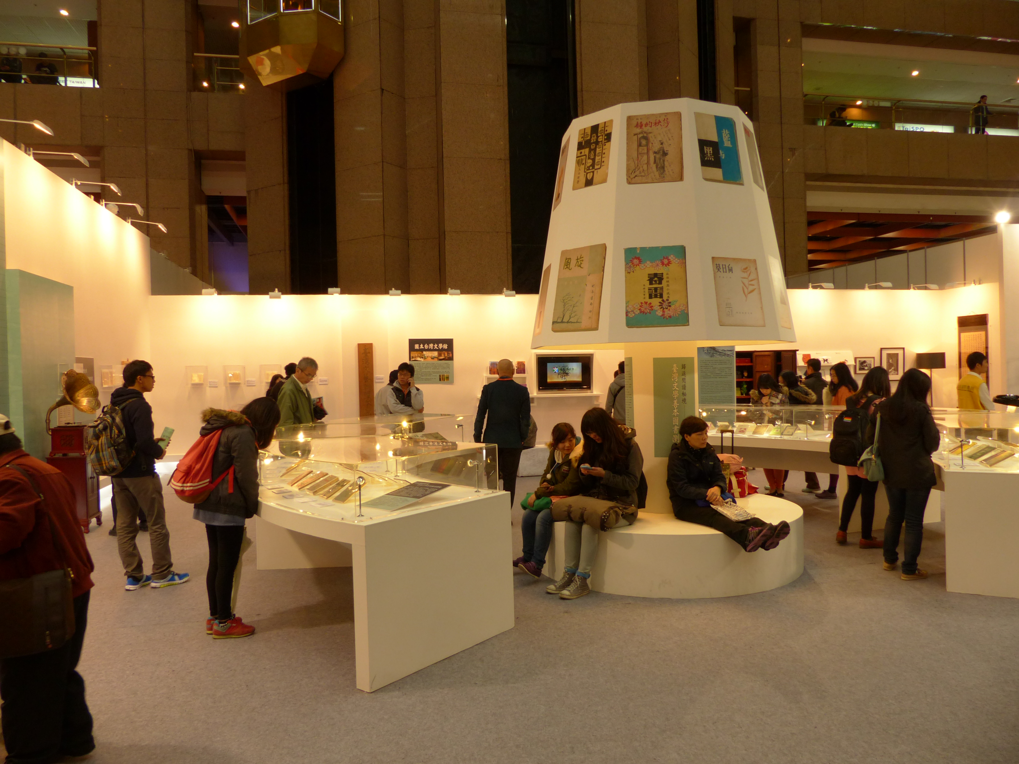 第22屆臺北國際書展，世貿一館國立台灣文學館展示區。